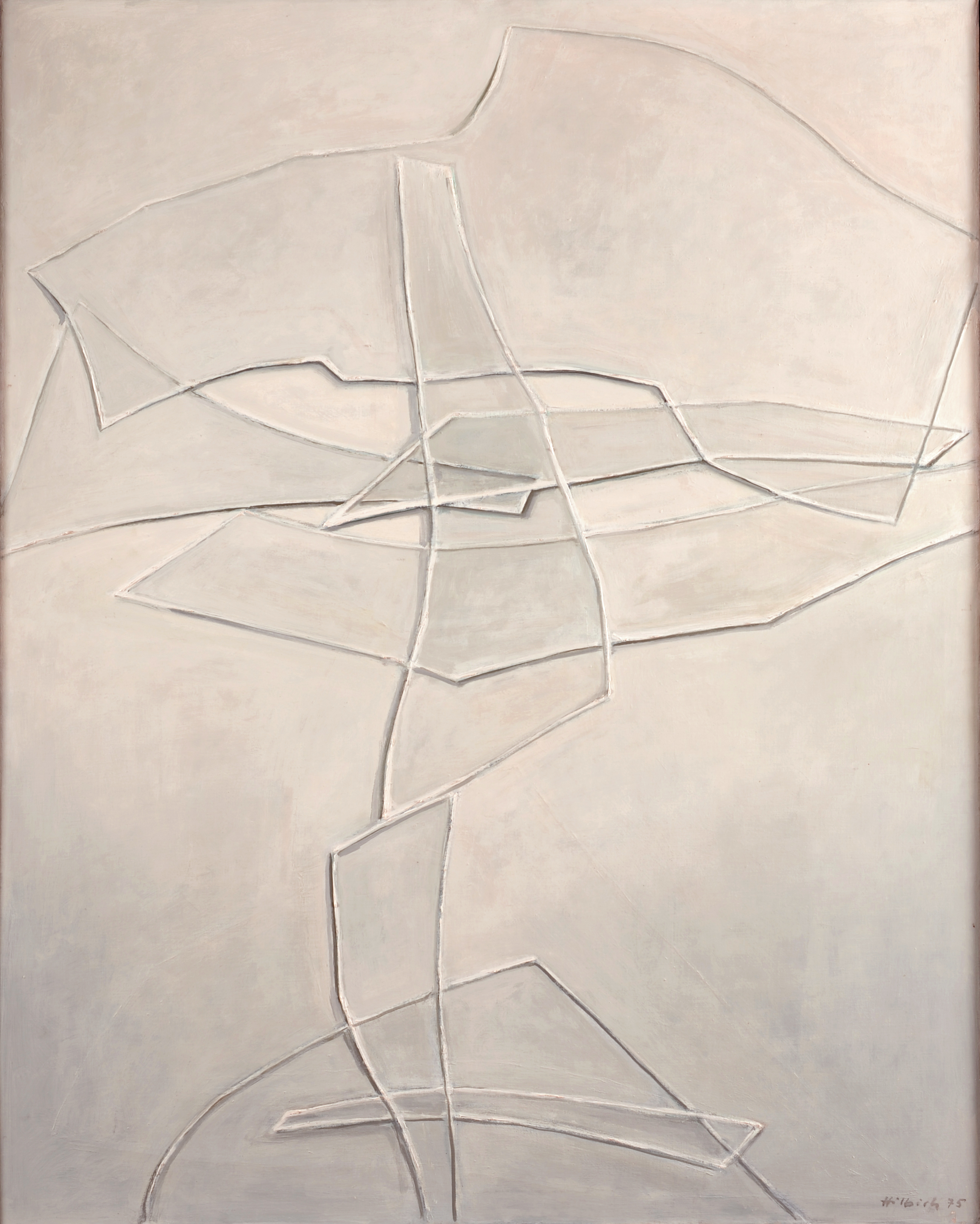 Engelbert Hilbich (1923-2011), Maler, hat sich zeitlebens mit der abstrakten Malerei auseinandergesetzt. Das "Scherbenkreuz" stammt aus einer Serie von "Glasscherbenbildern".